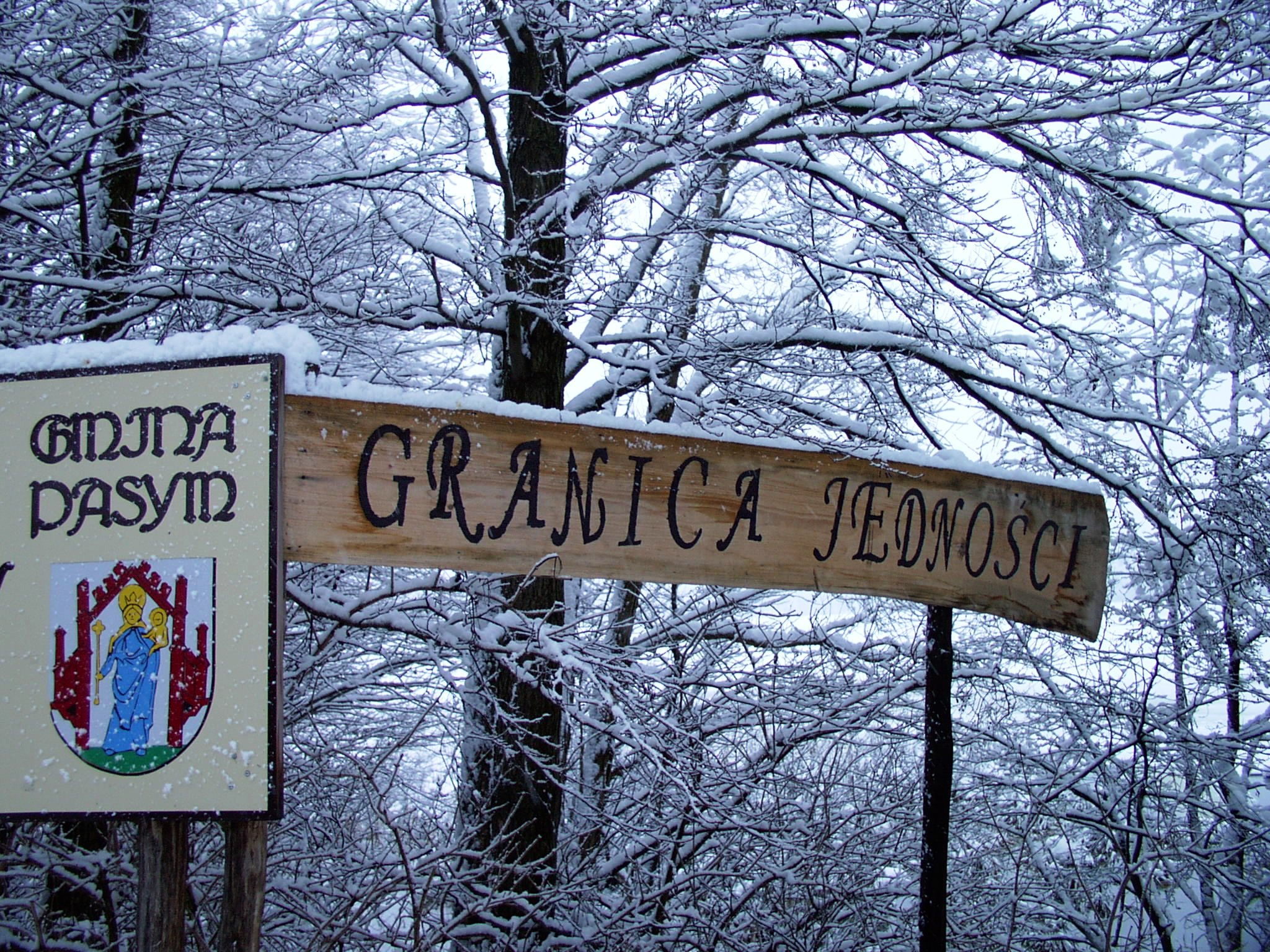 Łajs k. Olsztyna